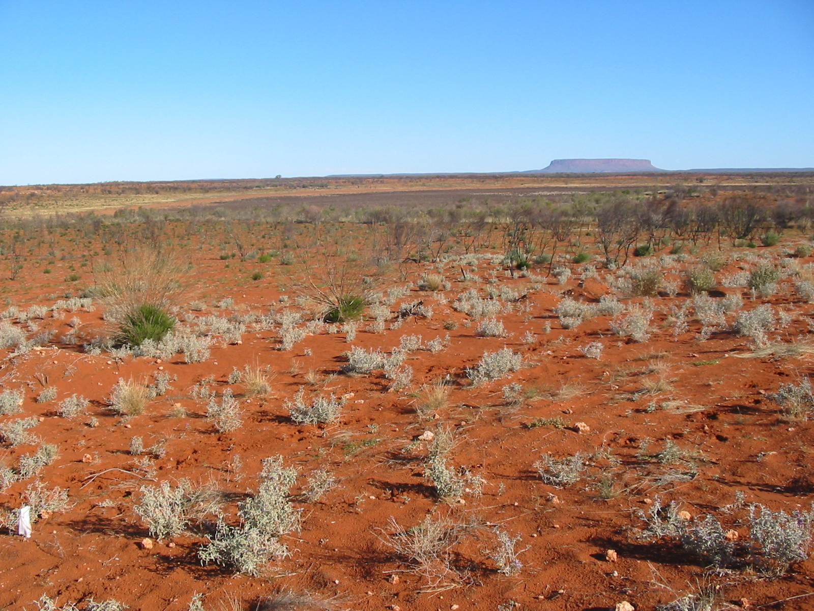 Ebene im Red Centre ca. 40 km östlich des Mount Connor